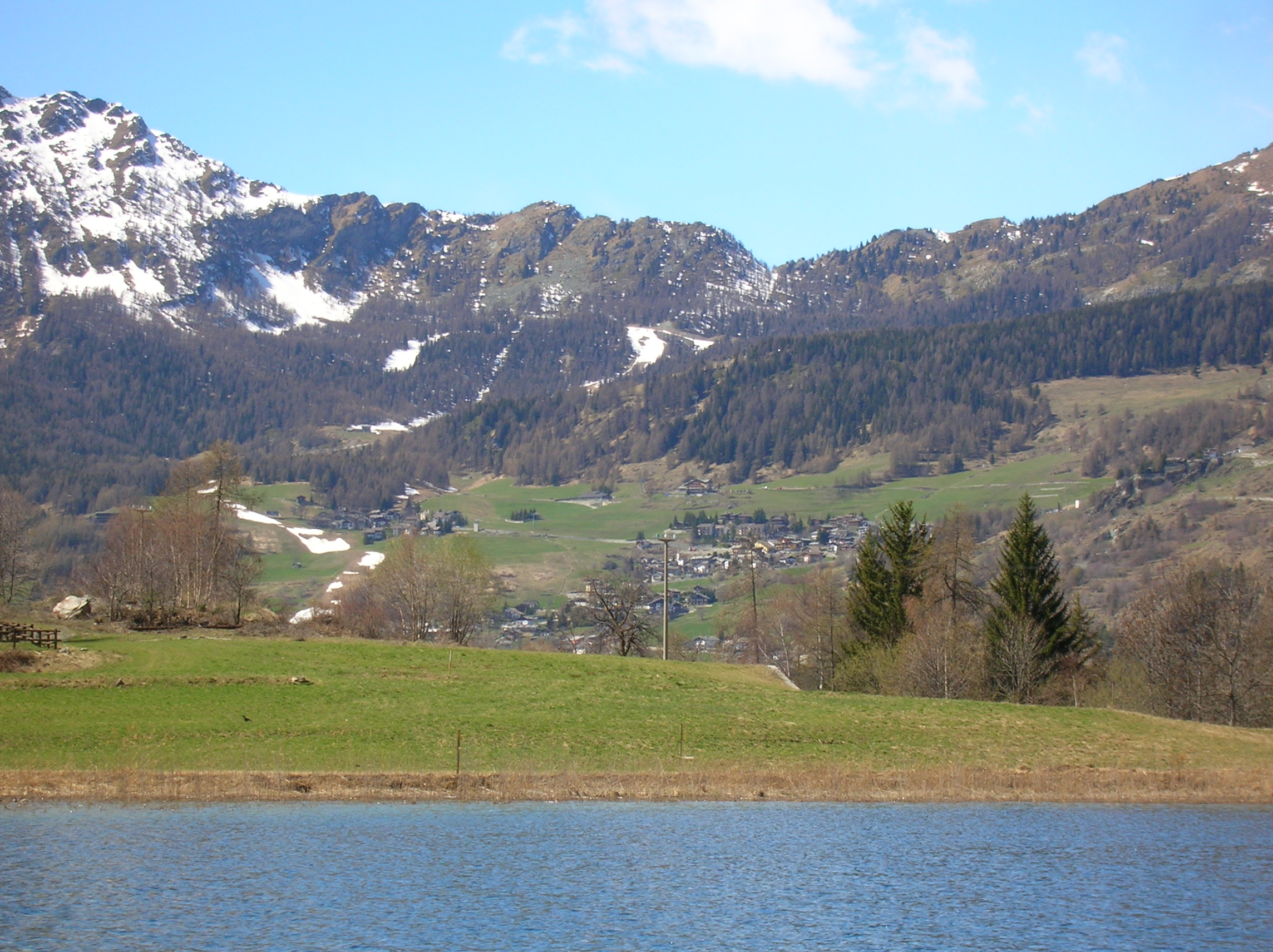 Lago di Lod in loc. Lod, Antey-Saint-André, Valle d'Aosta, Italia. Sullo sfondo, sull'altra montagna, si vede il comune di Torgnon.